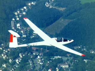 Thomas Gerlach, Traugott Lambeck Glasflügel 401 "Kestrel" über dem Bergischen Land